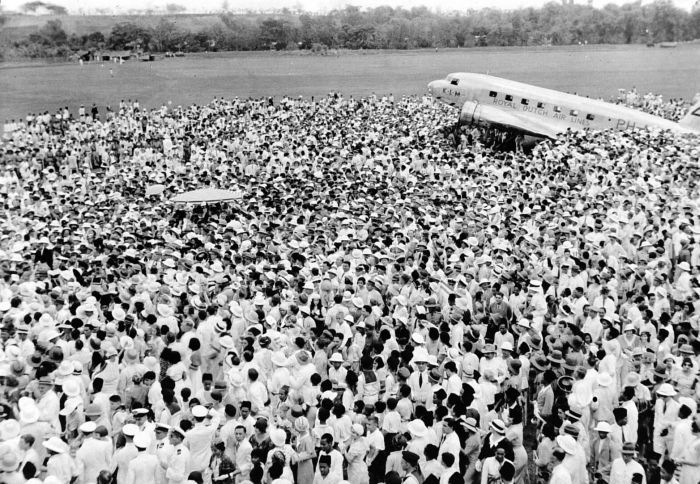 Repronegatief. Aankomst van de 'Uiver' na de Londen-Melbourne-race op het Darmo-vliegveld te Surabaya, Java